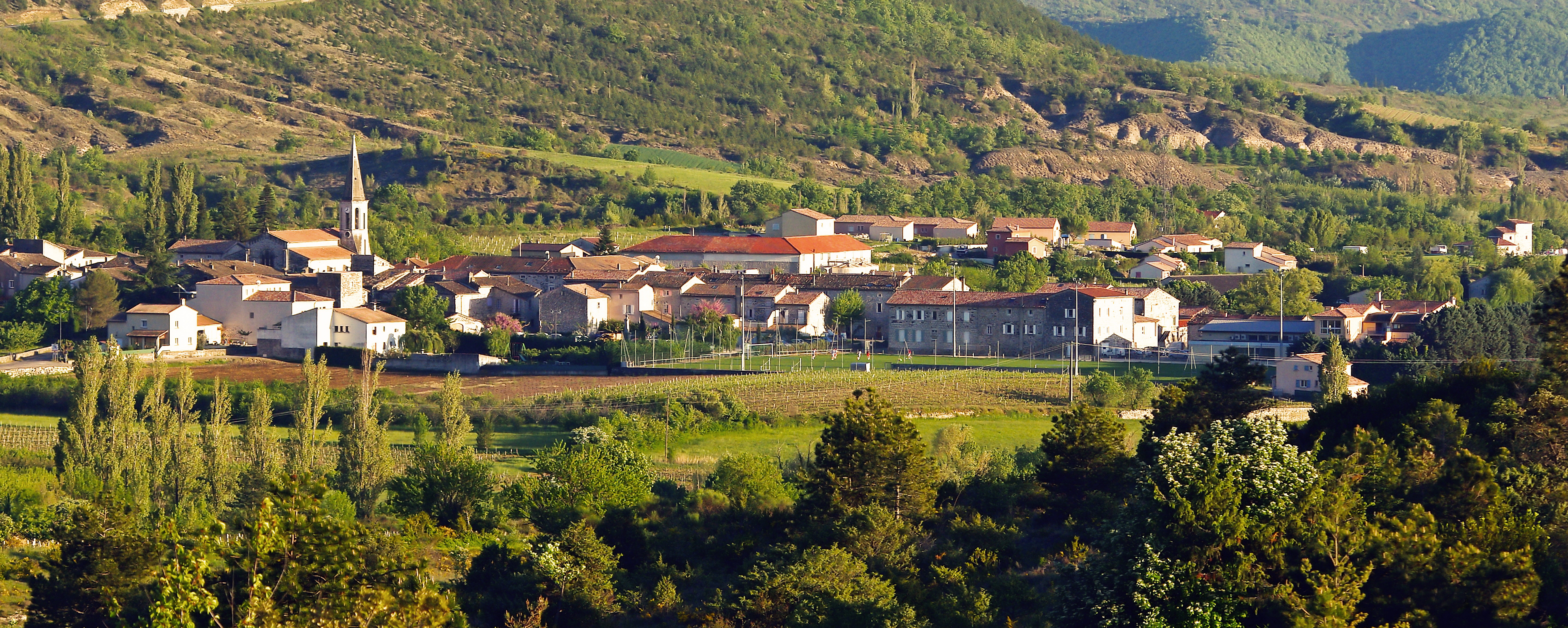 Lussas vue générale